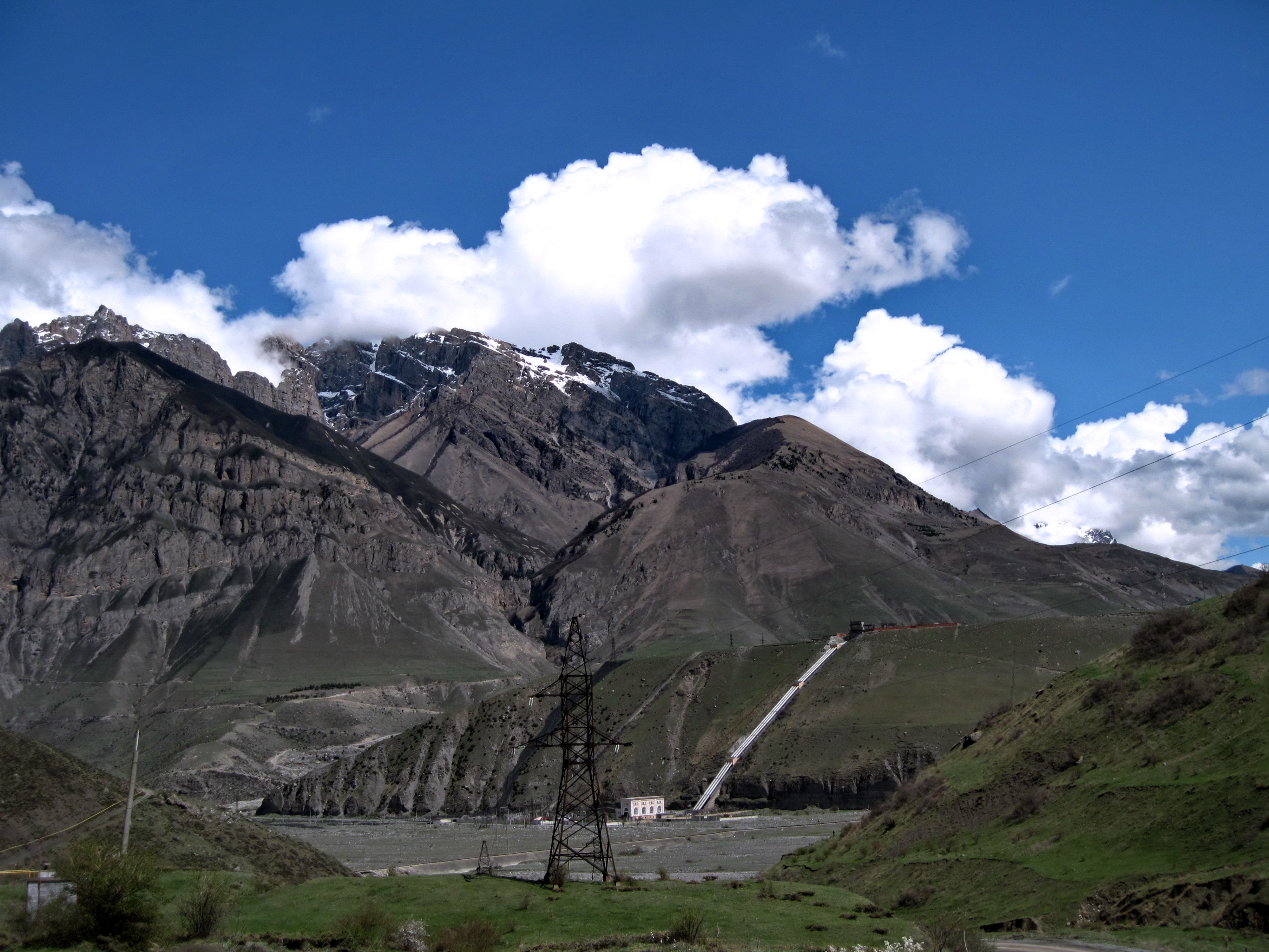 Эзминская ГЭС в Дарьялском ущелье.